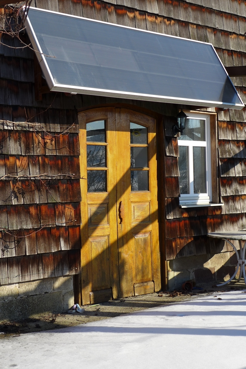 Reicht die Fläche der Fassade nicht aus, eignet sich die Montage mittels Dreiecksstützen. Als Zusatznutzen entsteht ein Vordach.